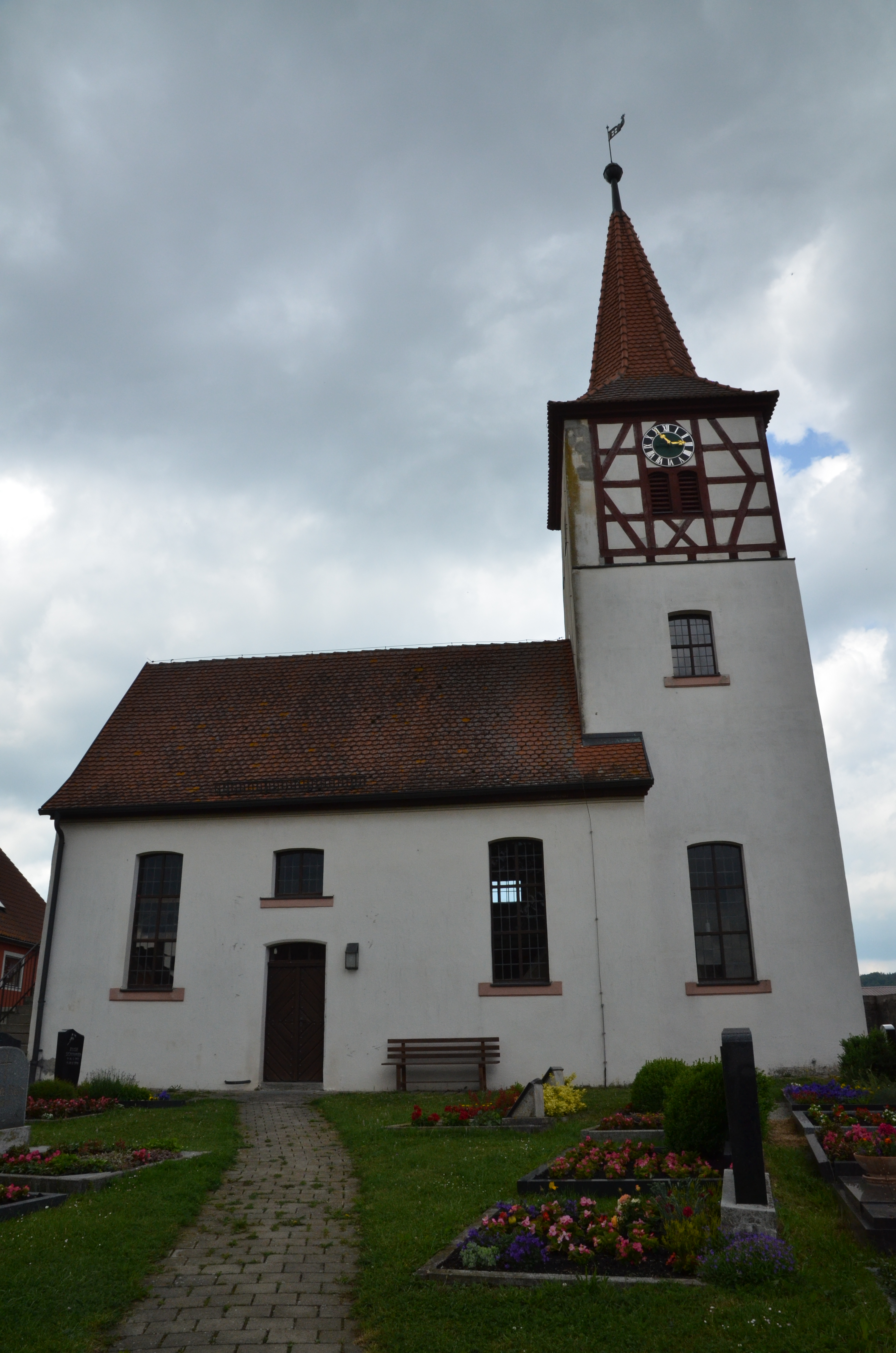 evang.-luth. Kirche St. Kilian und Kunigunde in Berglein